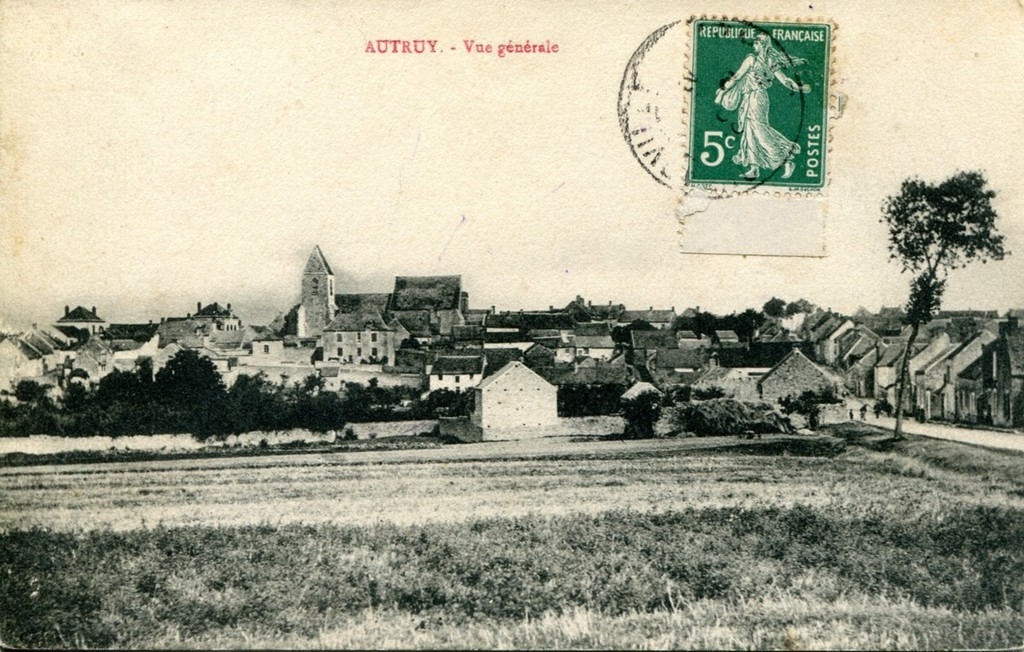 Carte postale du village vers 1910.